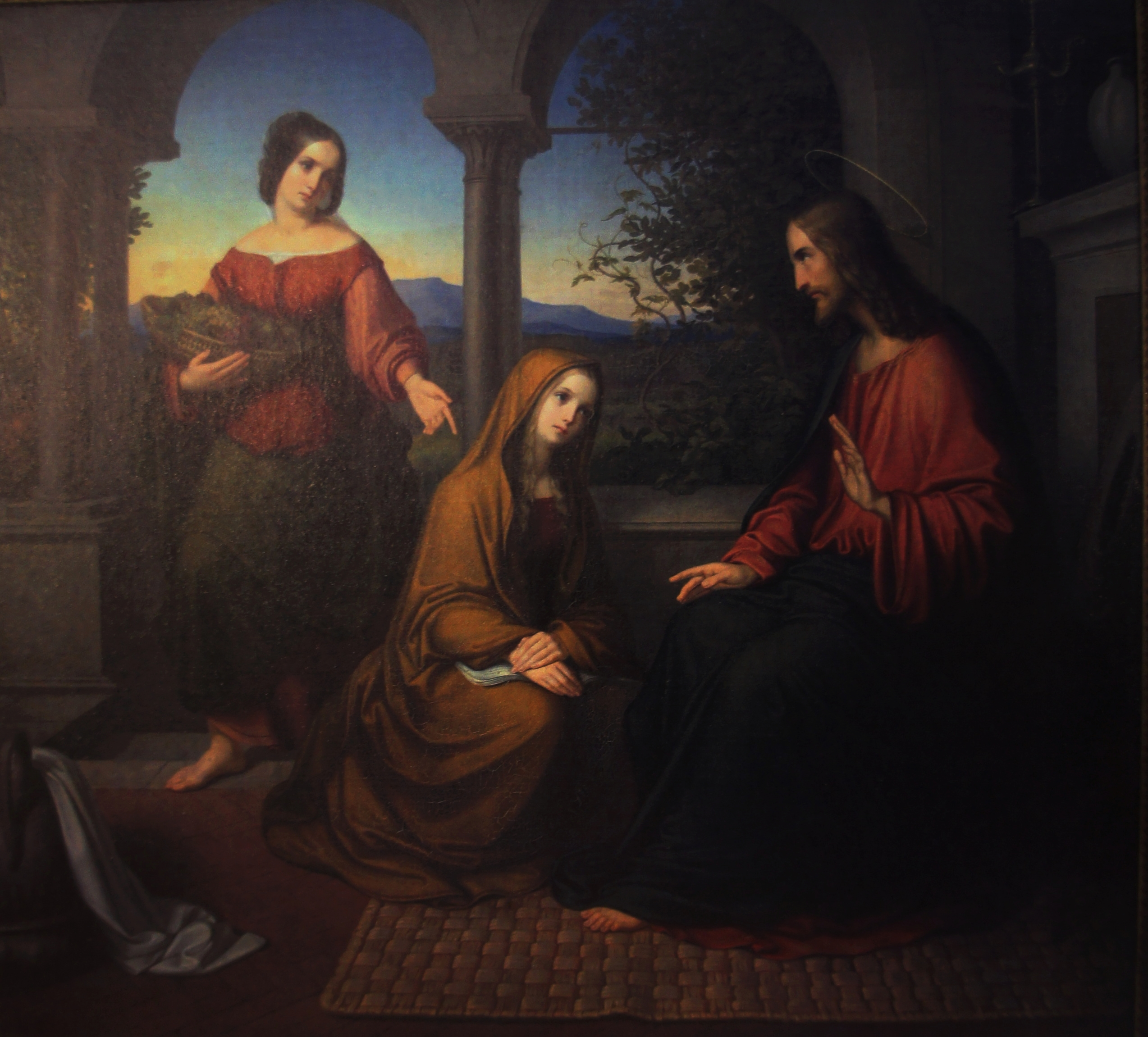 Christus bei Maria und Martha. Standort des Gemäldes: Sakristei der St. Marienkirche in Pirna